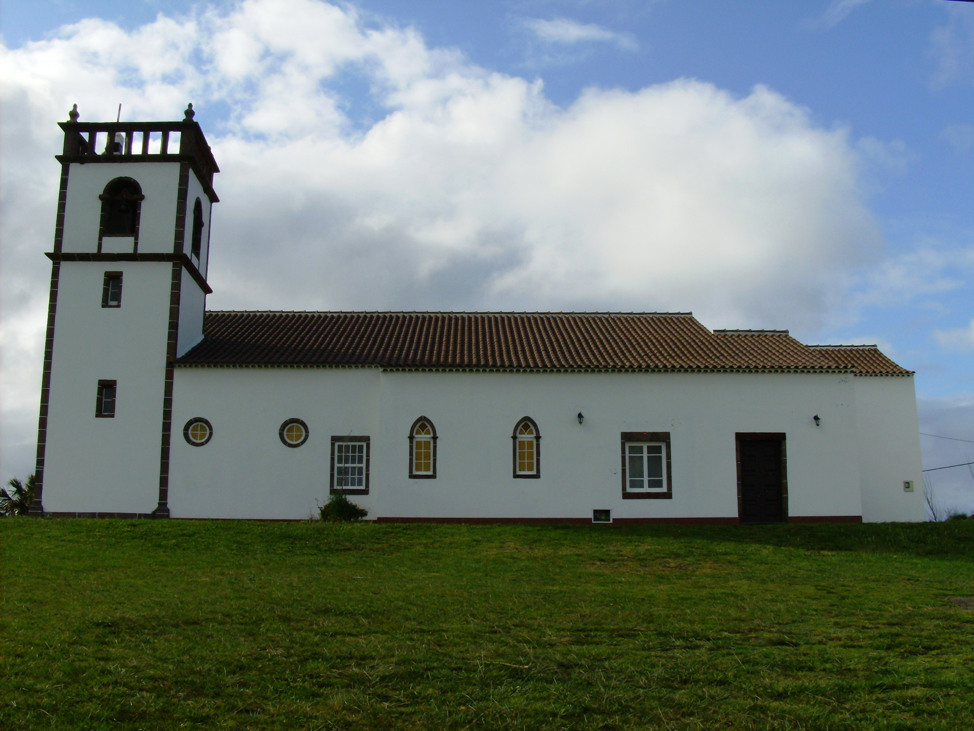 Igreja de Nossa Senhora do Bom Despacho (Almagreira), Ilha de Santa Maria (Açores), Portugal.